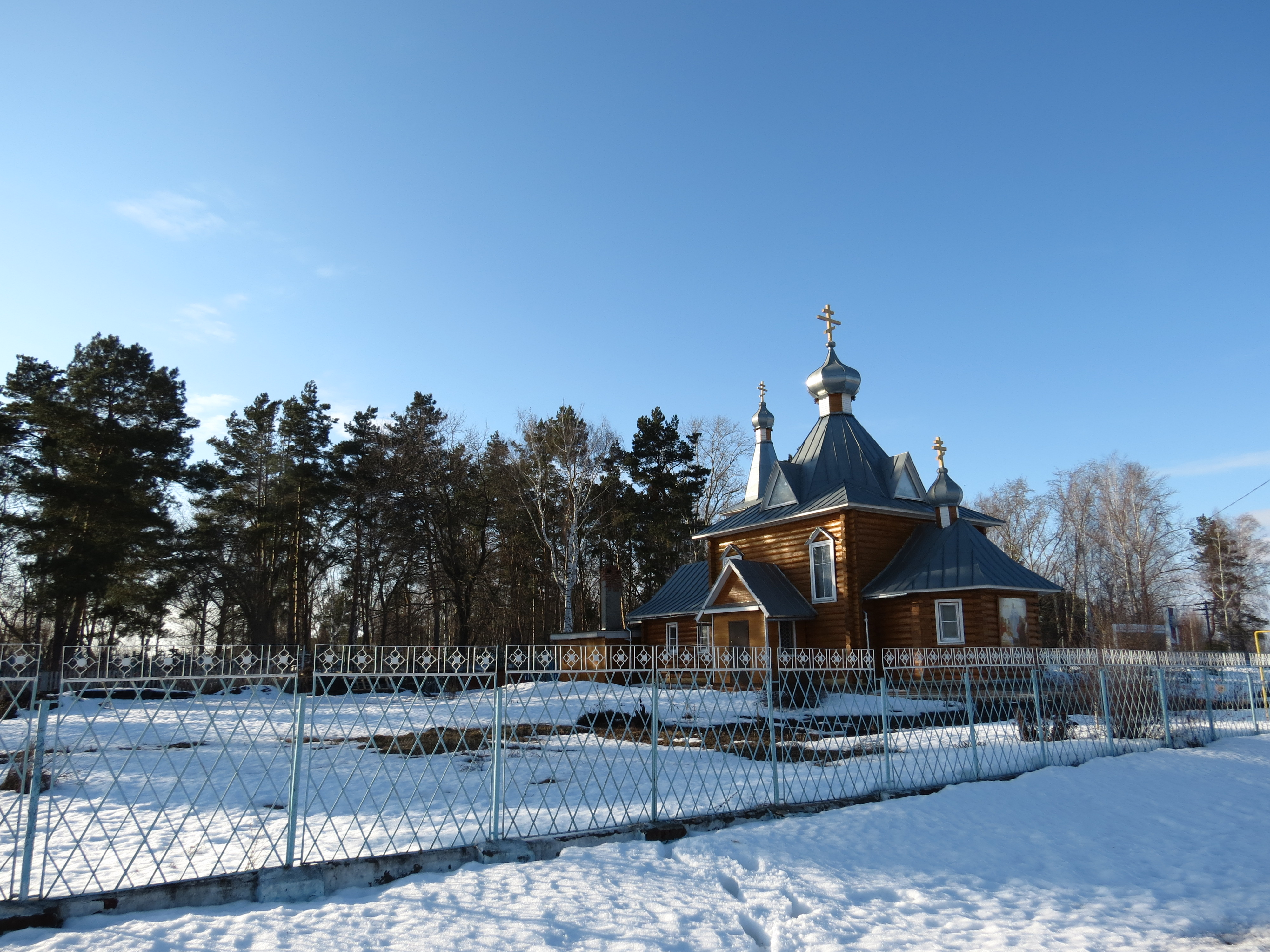 Церковь Успения Пресвятой Богородицы (год постройки - 2003)